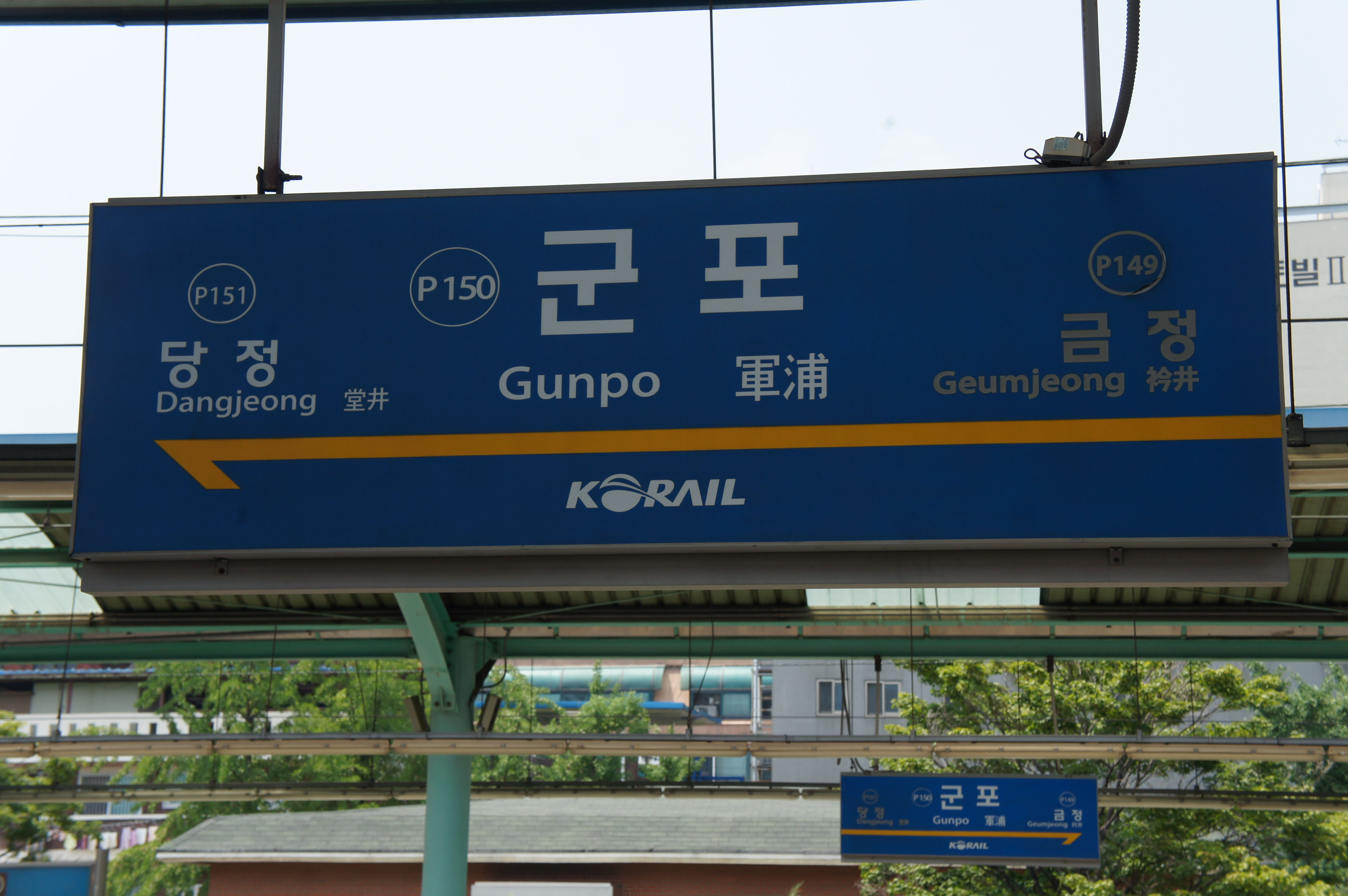 군포역 역명판